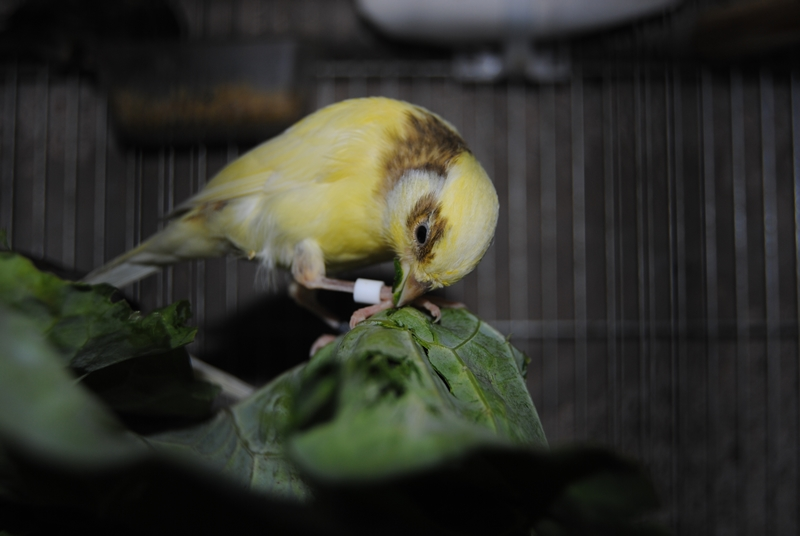 Canario Timbrado Español.